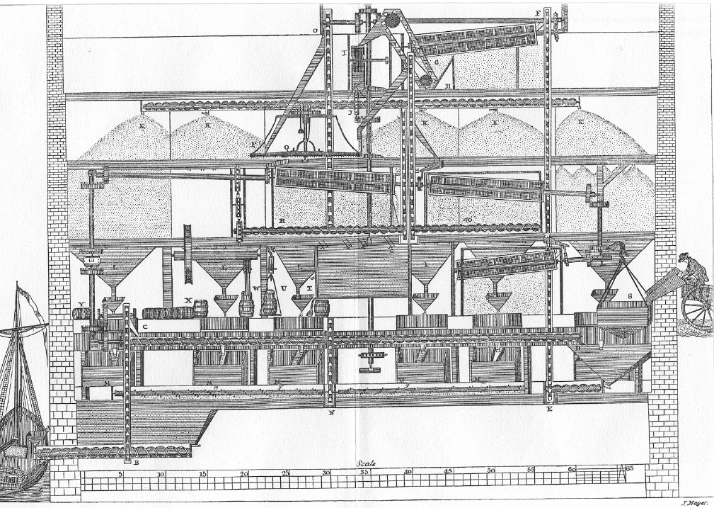 Schema der ersten automatisierten Mühle von Oliver Evans